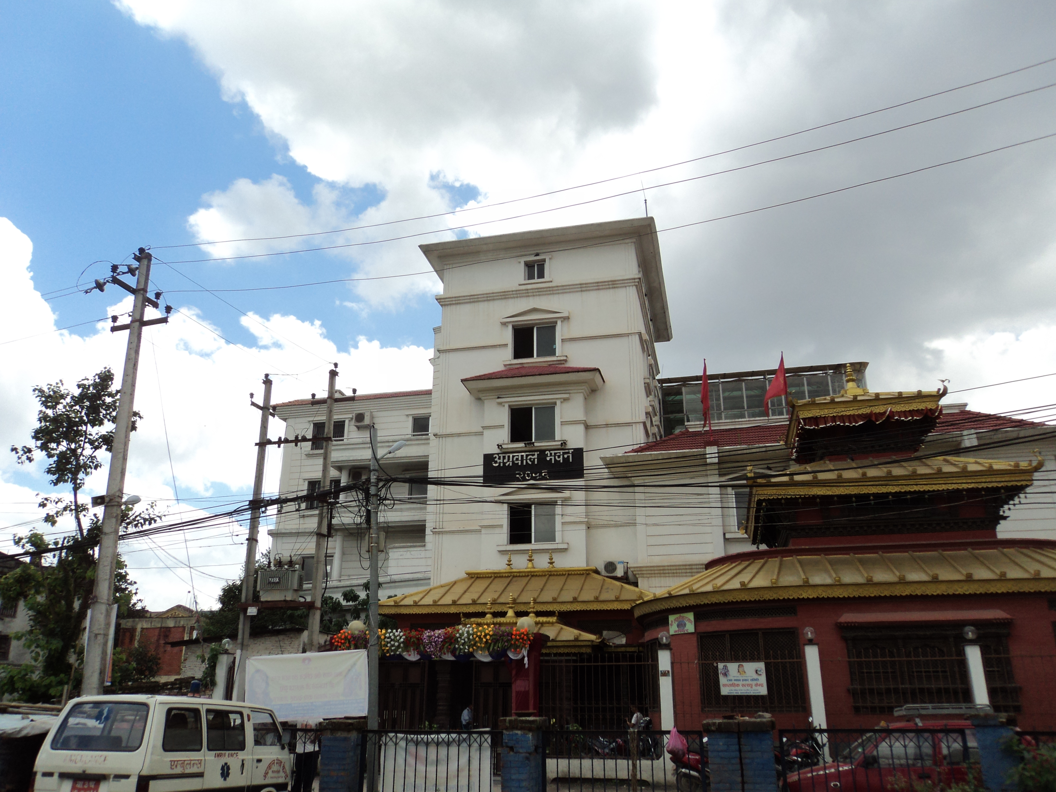 Gaelg: अग्रवाल सेवा केन्द्र (अग्रवाल भवन)